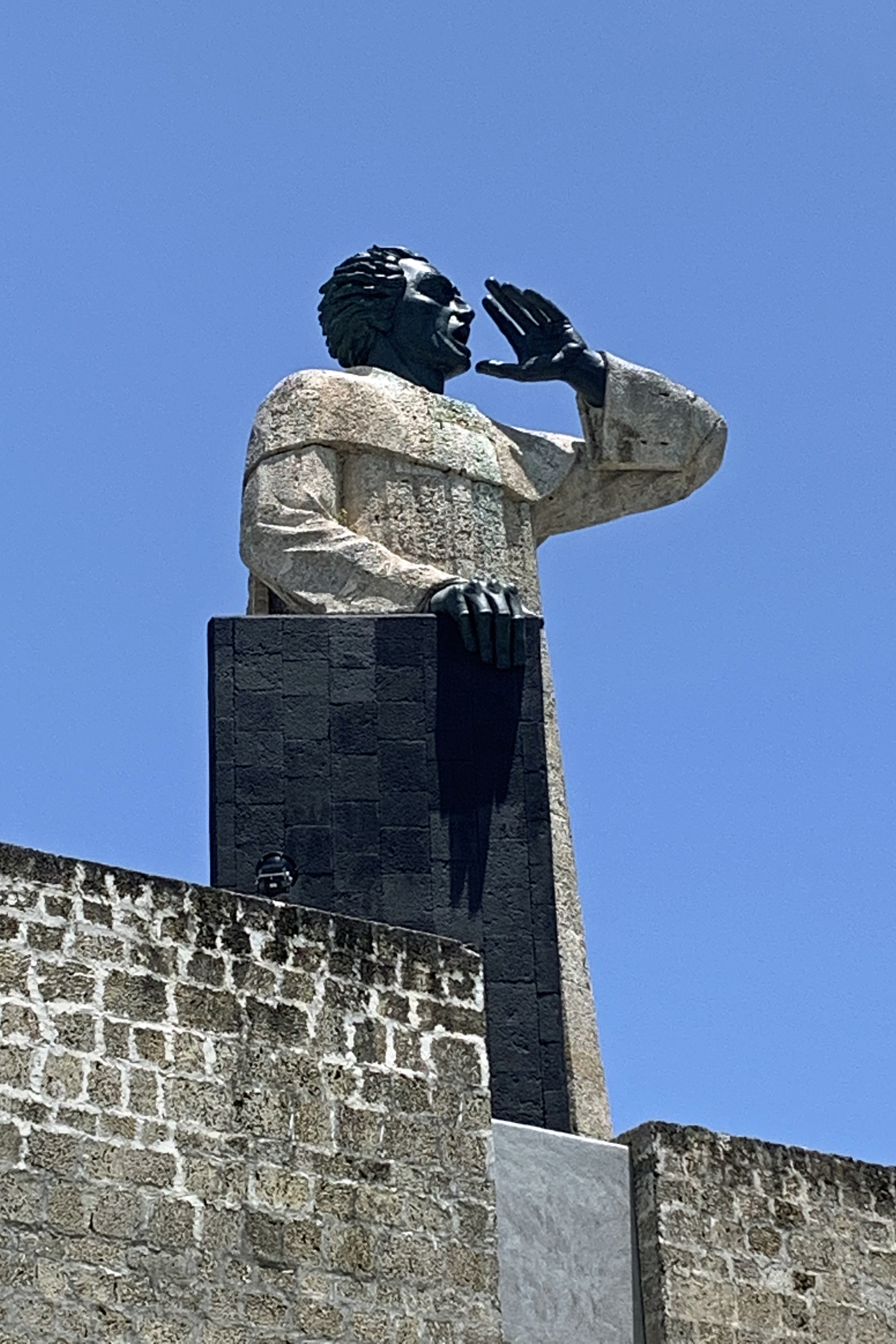 Monumento Fray Antonio de Montesinos, Malecón Santo Domingo, República Dominicana